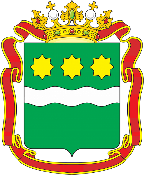 Герб Амурской области в редакции 2008 года. Щит окружён лентой ордена Ленина, которым область была награждена в 1967 году